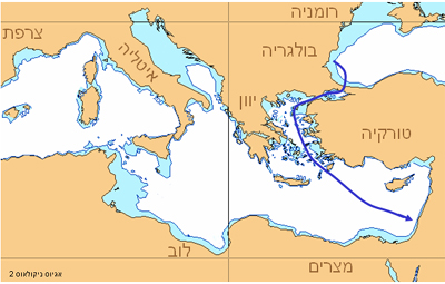 אגיאוס ניקולאוס 2 - מסלול